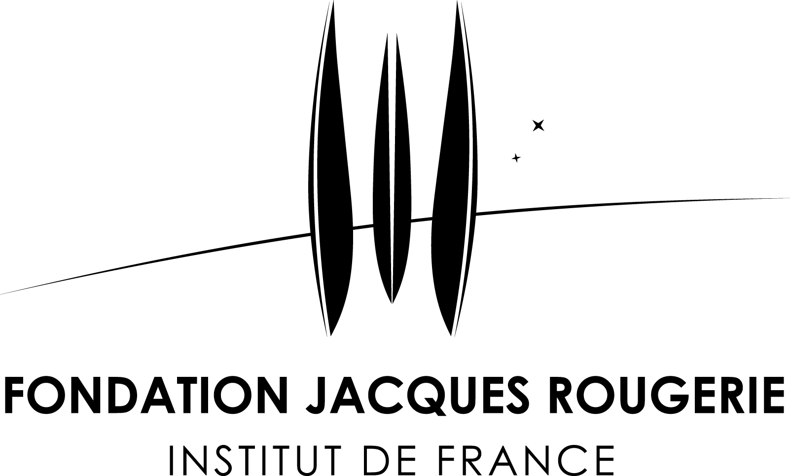 Logo de la Fondation Jacques Rougerie - Institut de France